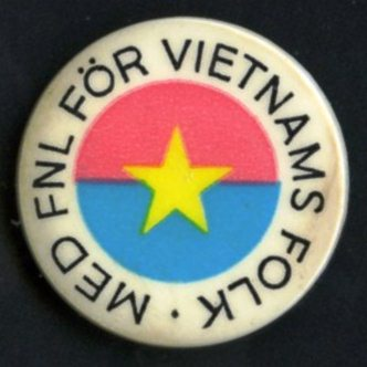 Svensk FNL-merke